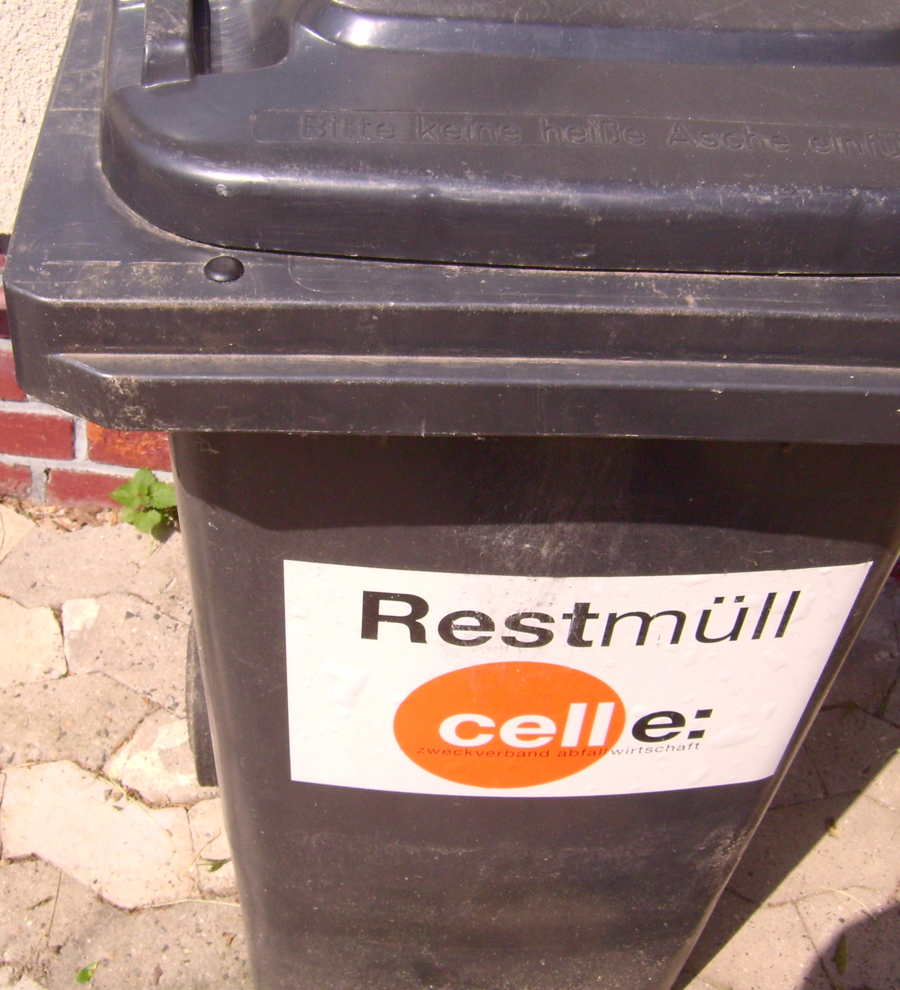 RFID-Chip an Cellex-Abfallbehaelter (Restmüll) 2013